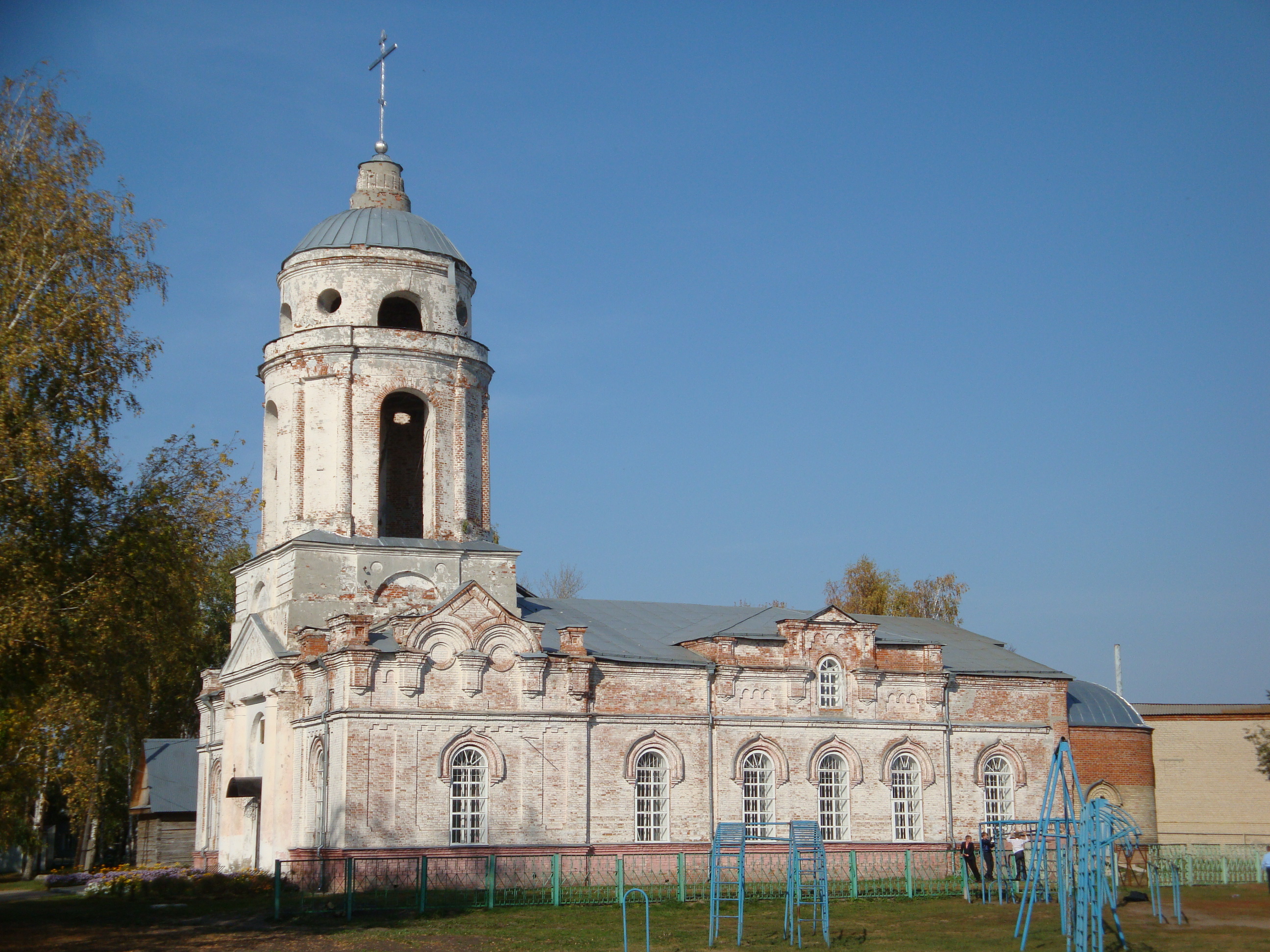 Покровский собор: центр, Наровчат, Наровчатский район, Пензенская область